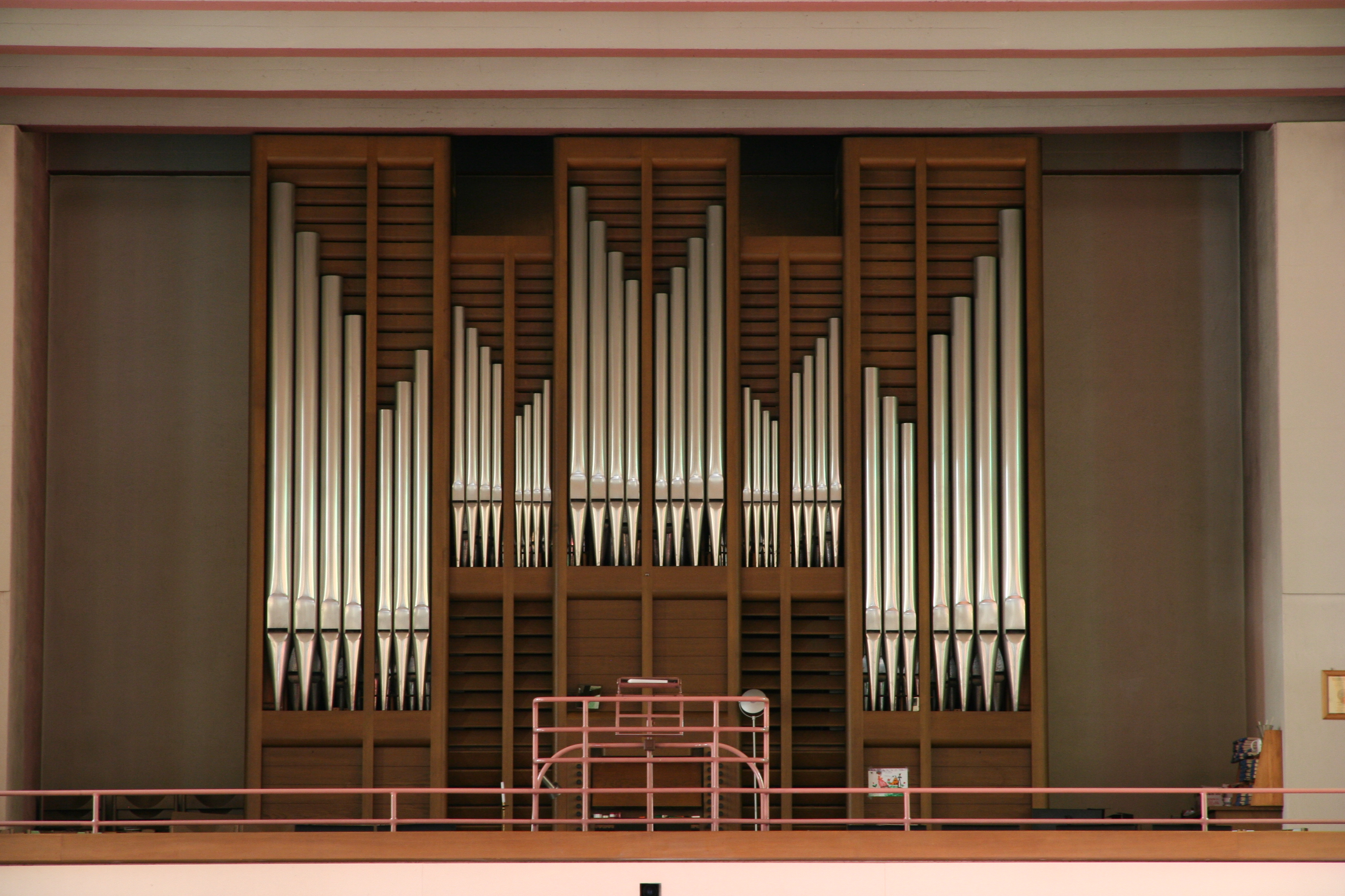 Römisch-katholische Pfarrkirche St. Josef Horgen, Orgel